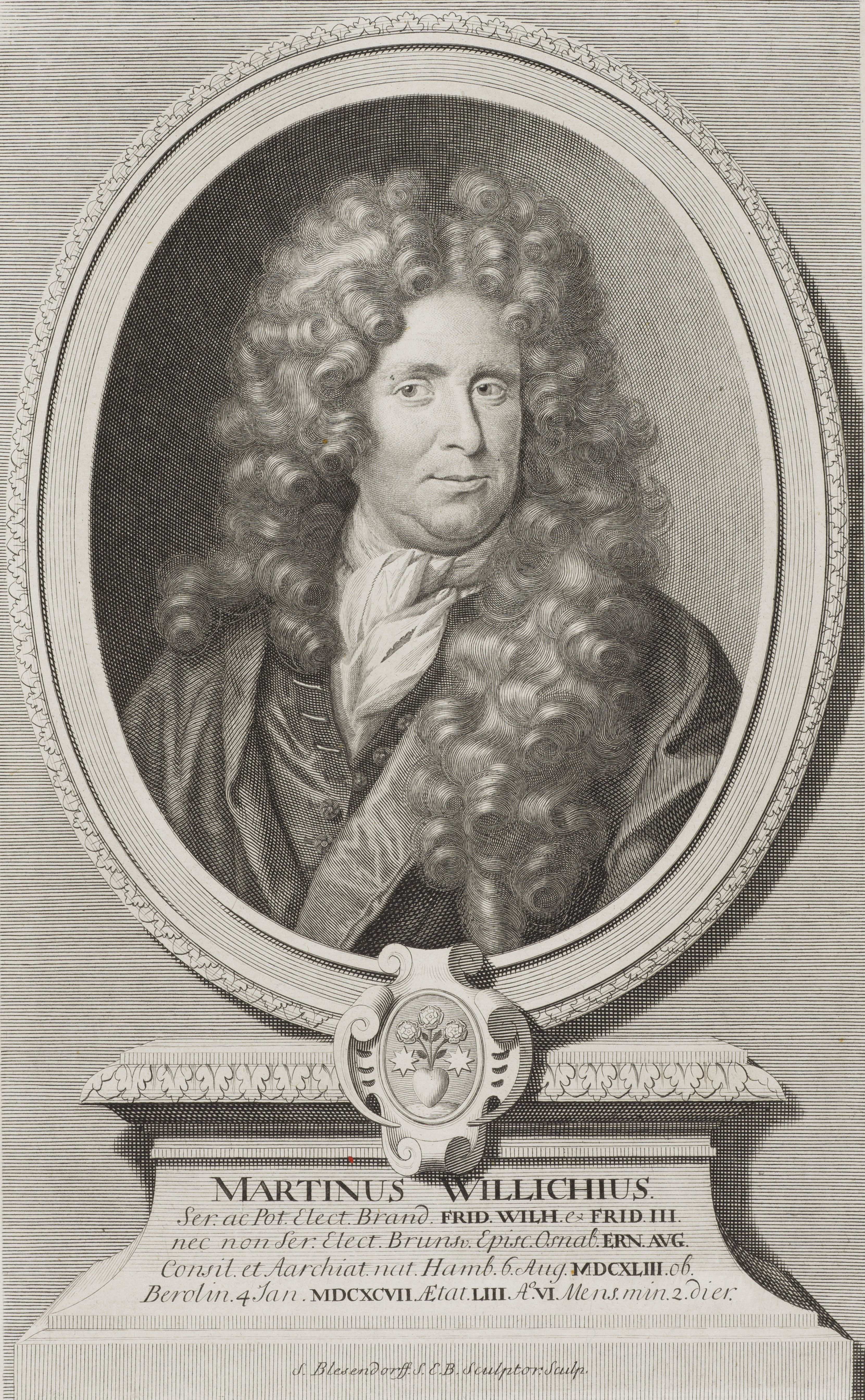 Bildnis von Martin Willich